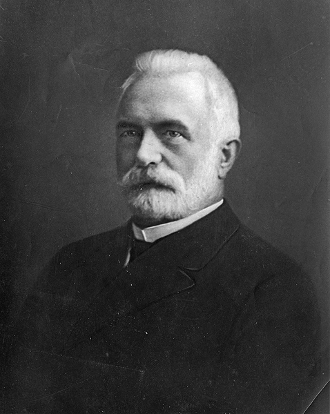 Albrecht Eyring, Kirchenrat und Pomologe